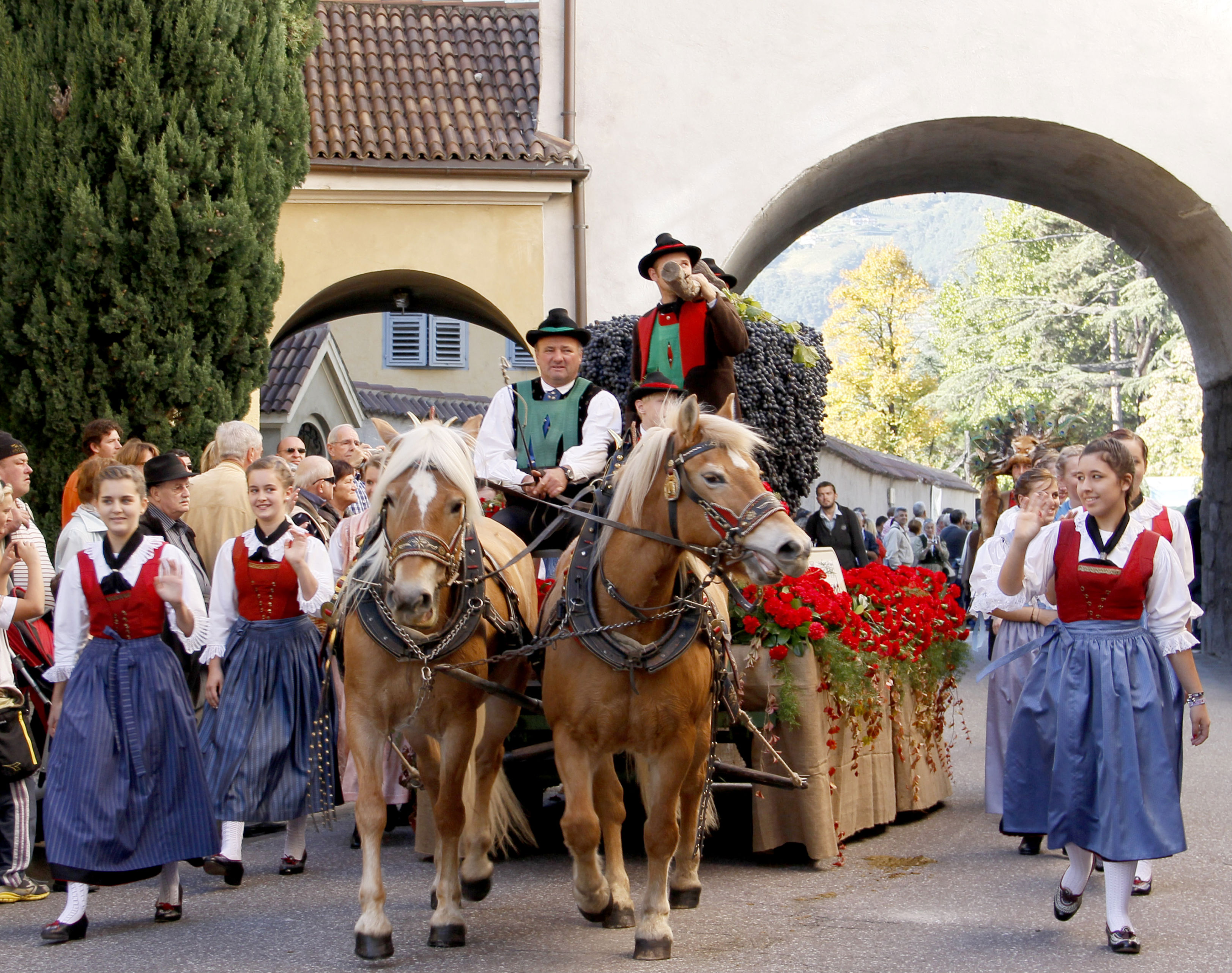 Festa dell'uva di Merano, Trento-Alto, Adige - Italia